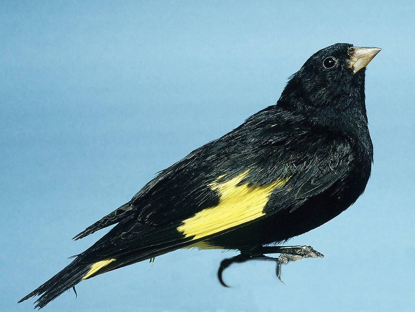 Black Siskin (male)